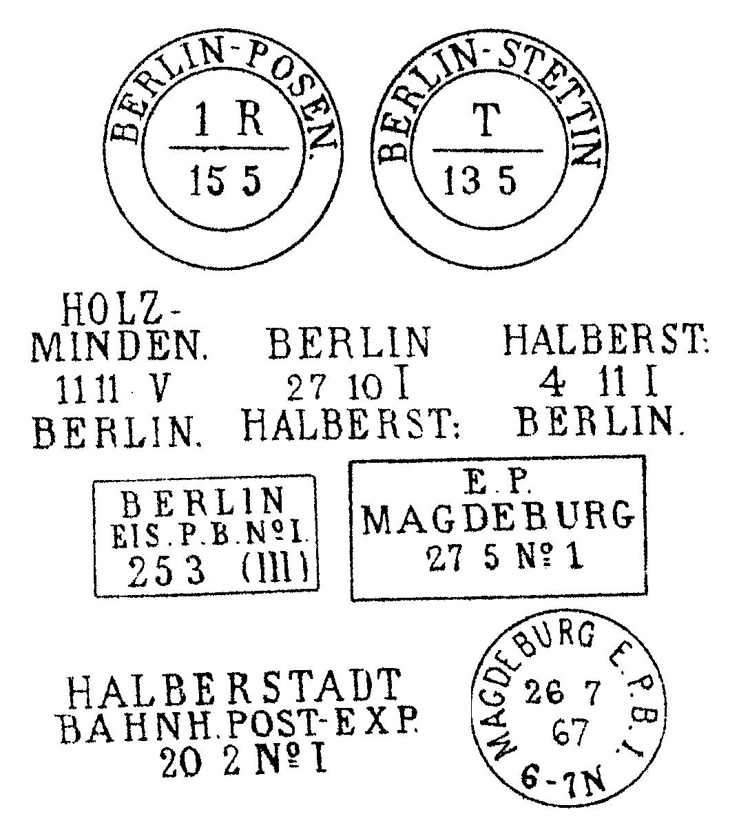 Eine Auswahl preußischer Bahnpoststempel zusammenkopiert W.Steven 1988